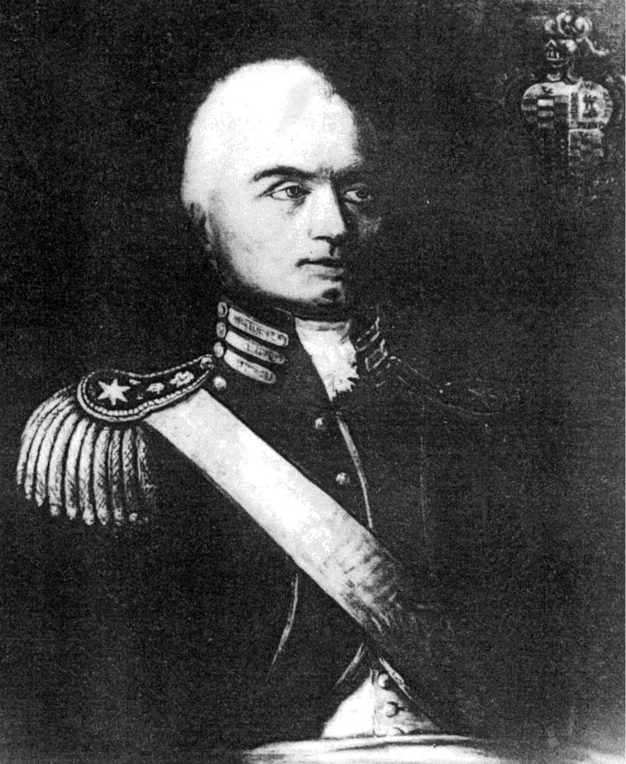 Coronel Don Pedro Andrés García de Sobrecasa